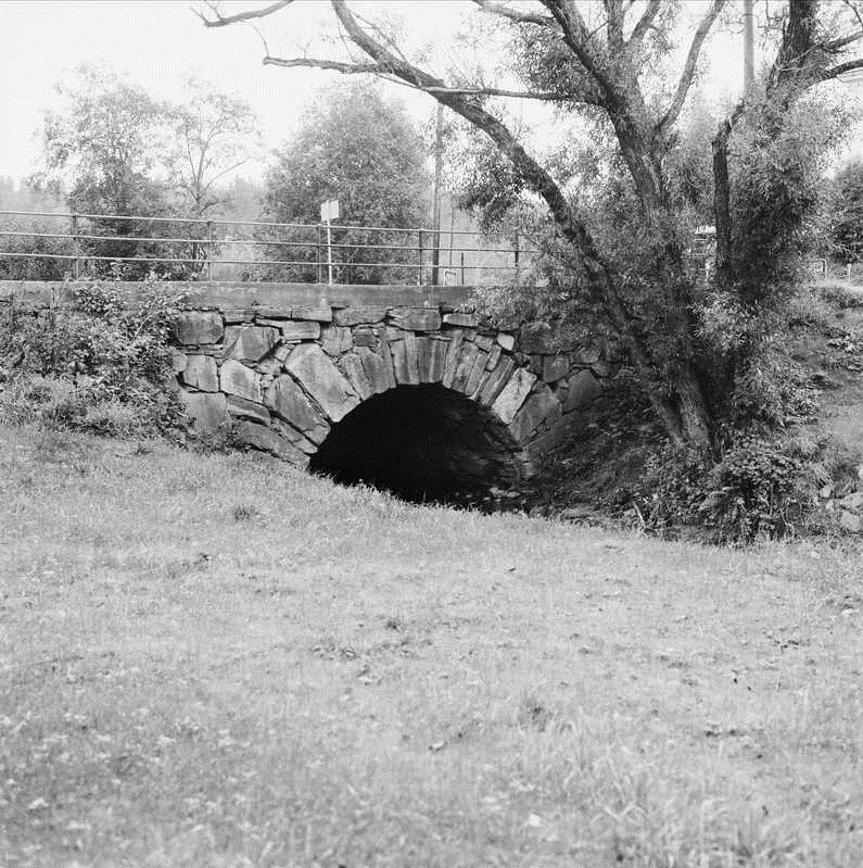 Selve Ljabru, der Ljabruveien krysser Ljanselva.